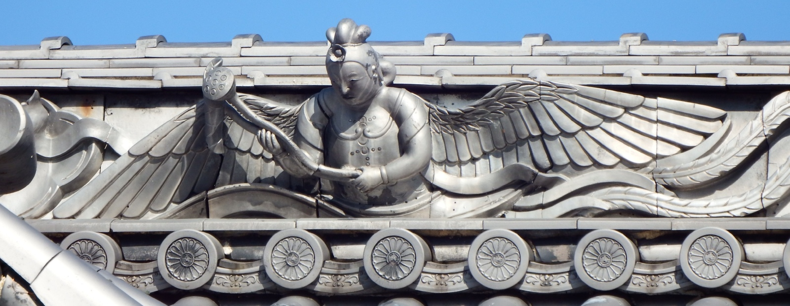 善通寺 南大門の迦陵頻伽